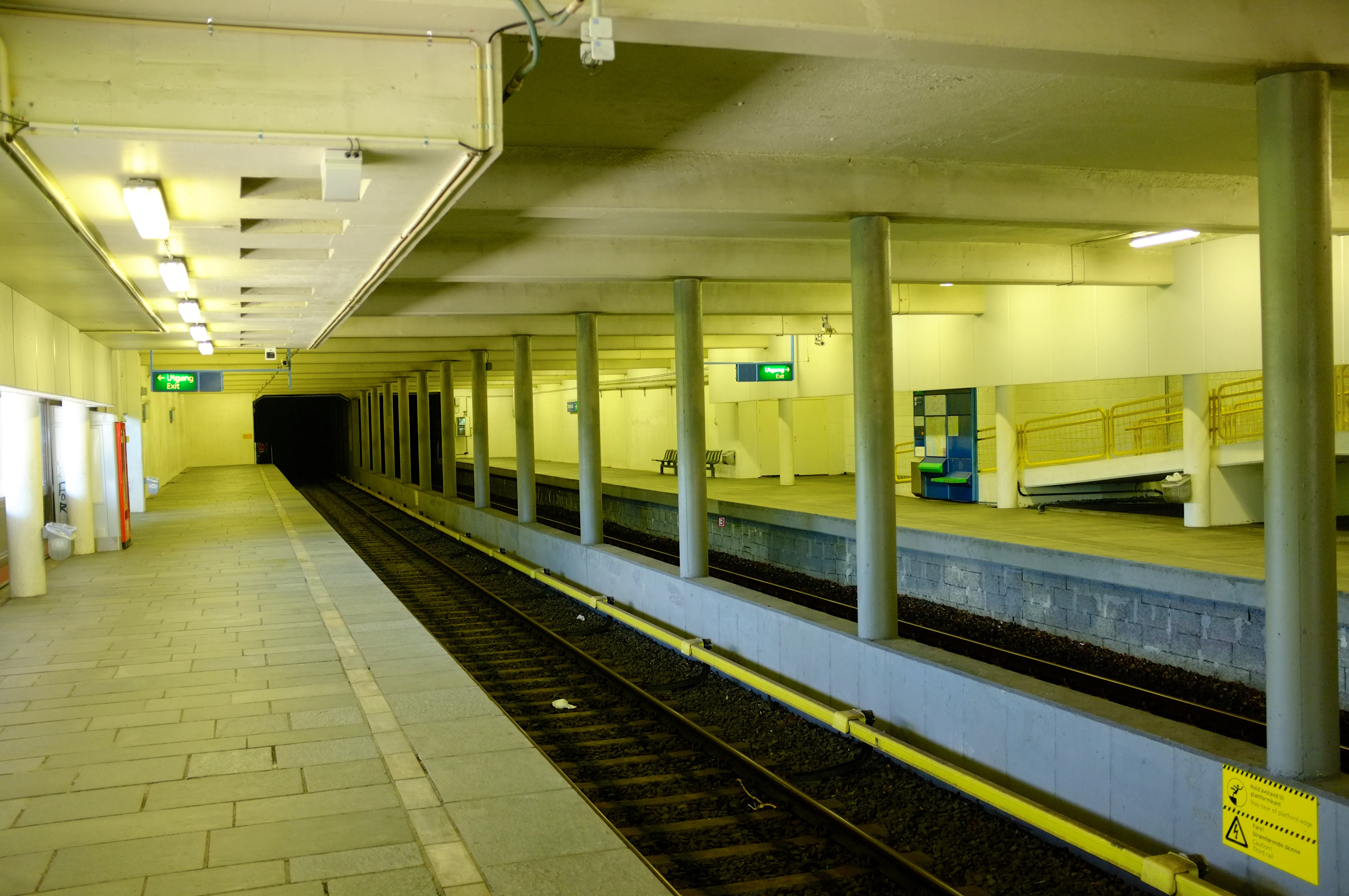 Trosterud stasjon i Oslo.